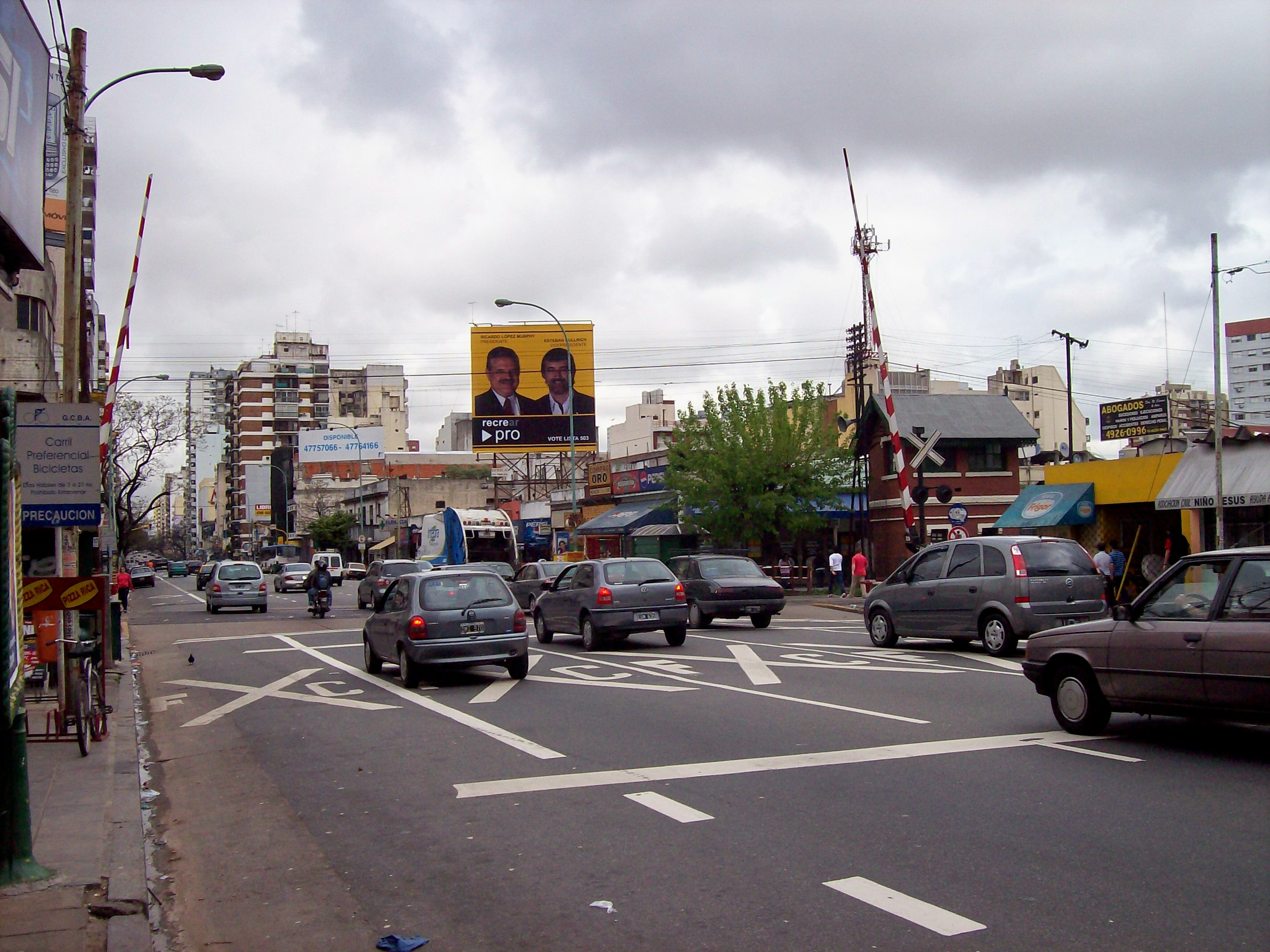 Avenida Corrientes, Villa Crespo, Buenos Aires, cruce con el ferrocarril San Martín, estación Chacarita.